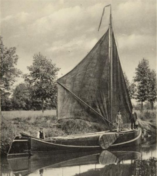 De laatste Enterse zomp in 1920 nog in bedrijf. Prentbriefkaart in 1920 uitgegeven door boekhandel J.C. Nieuwenhuis. Coll. Fries Museum